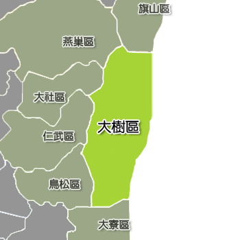 大樹區相對位置